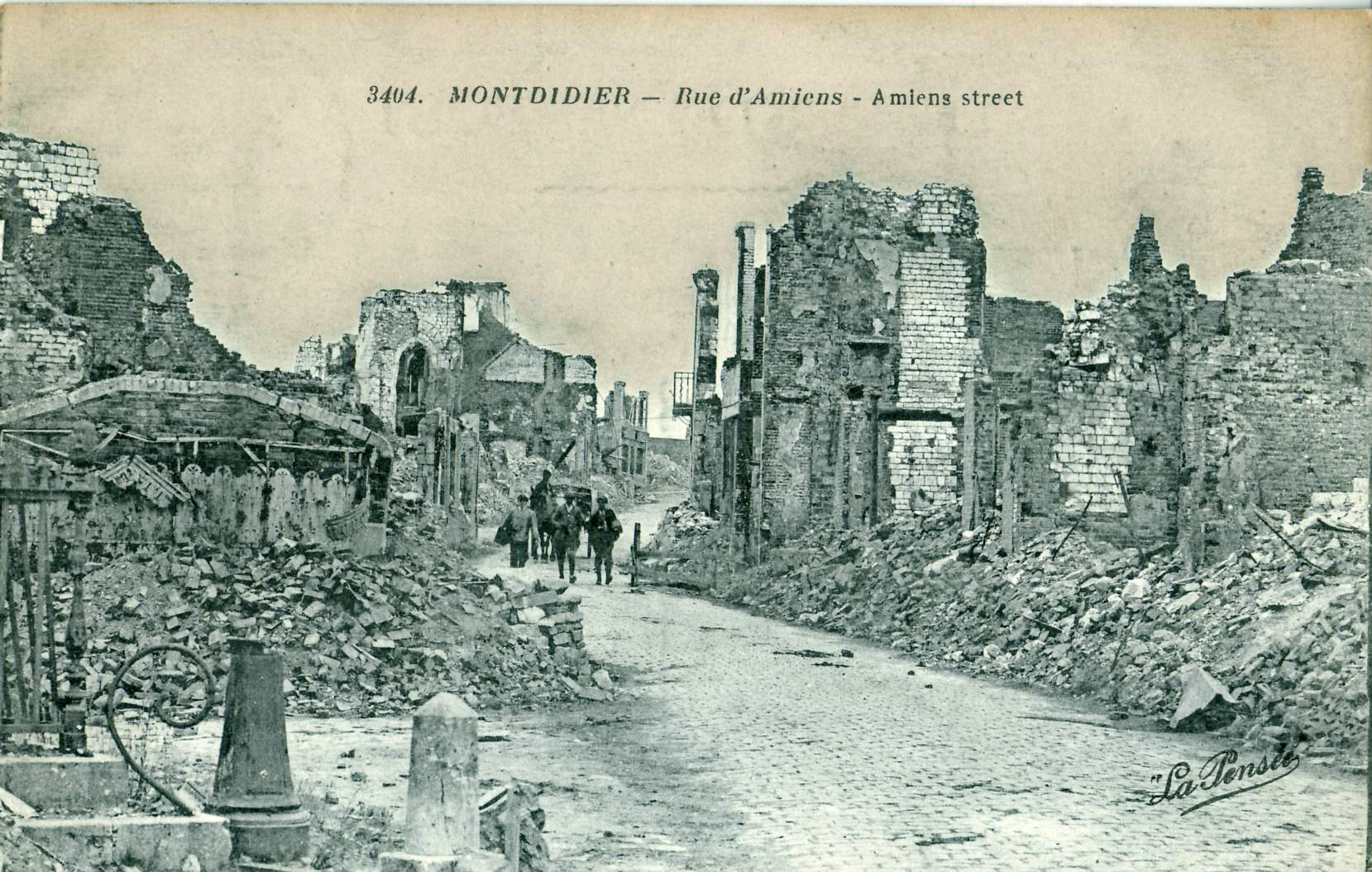 Carte postale ancienne éditée par Beaudinière, n°3404 : MONTDIDIER - Rue d'Amiens